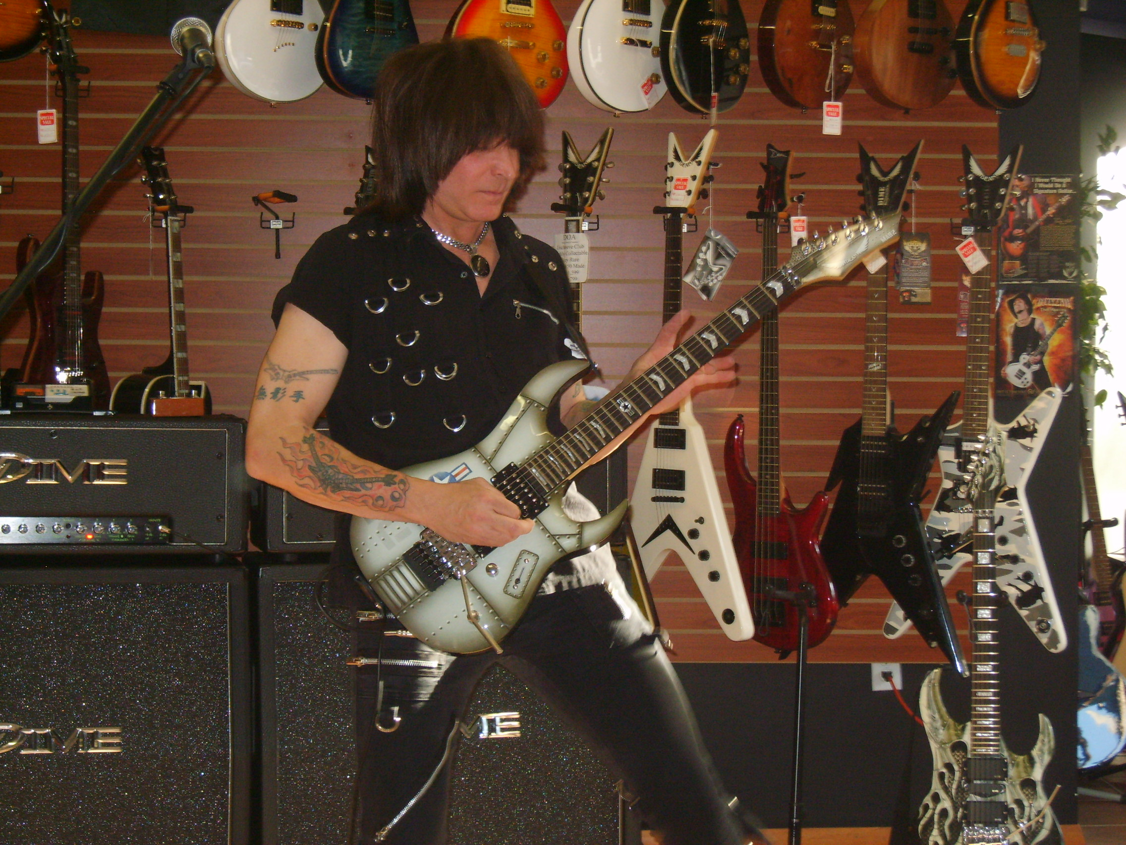 see title